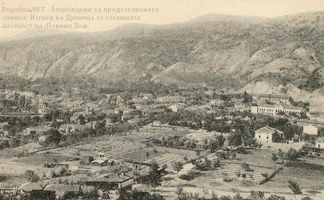 Стара Дупница, снимката е от периода 1895 - 1910 год. Благодарим на Официалния сайт на гр.Дупница за лщбезно предоставения файл